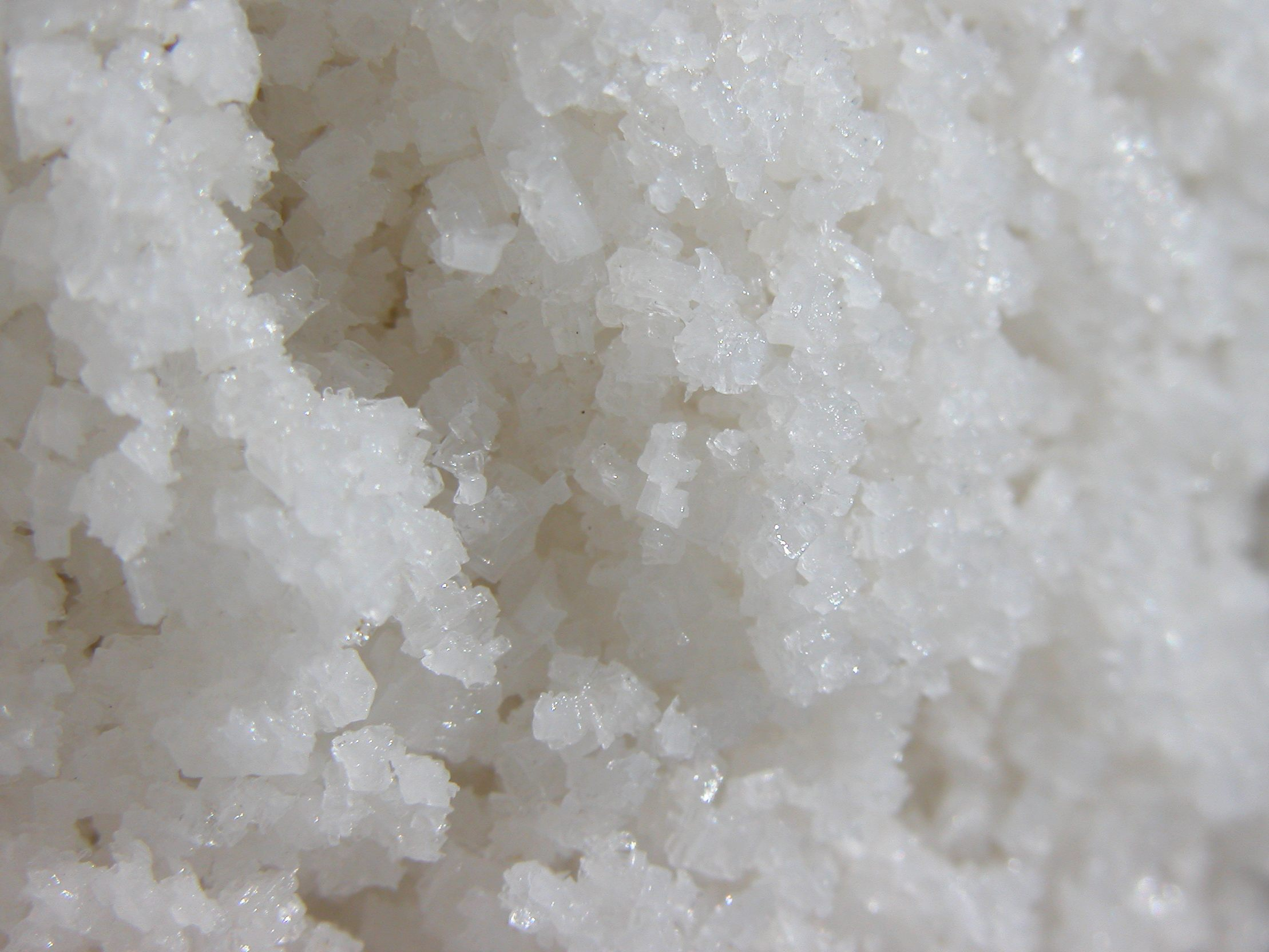 Fleur de Sel sea salt from Guérande, France